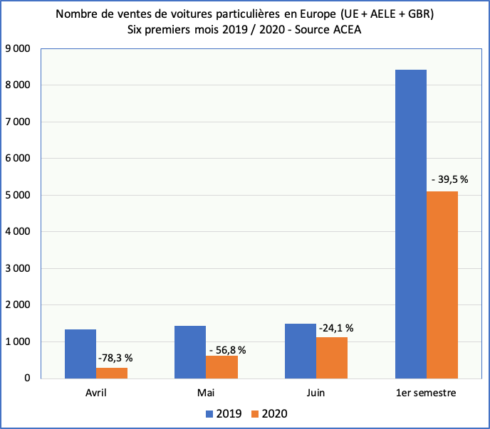 Évolution des ventes de voitures particulières en Europe depuis le début de l'année 2020 comparées à 2019. Source ACEA